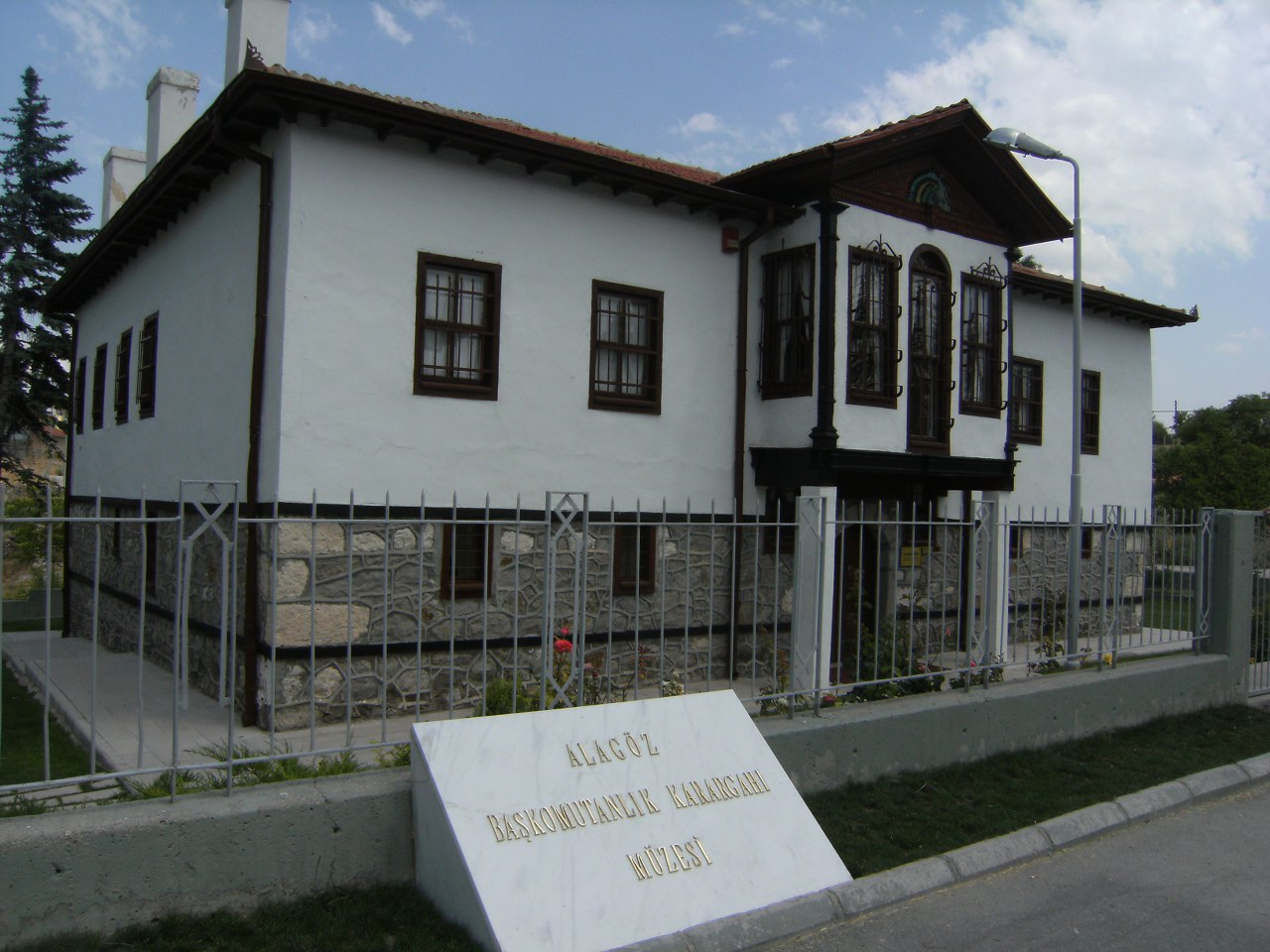 Alagöz Başkomutanlık Karargah müzesi